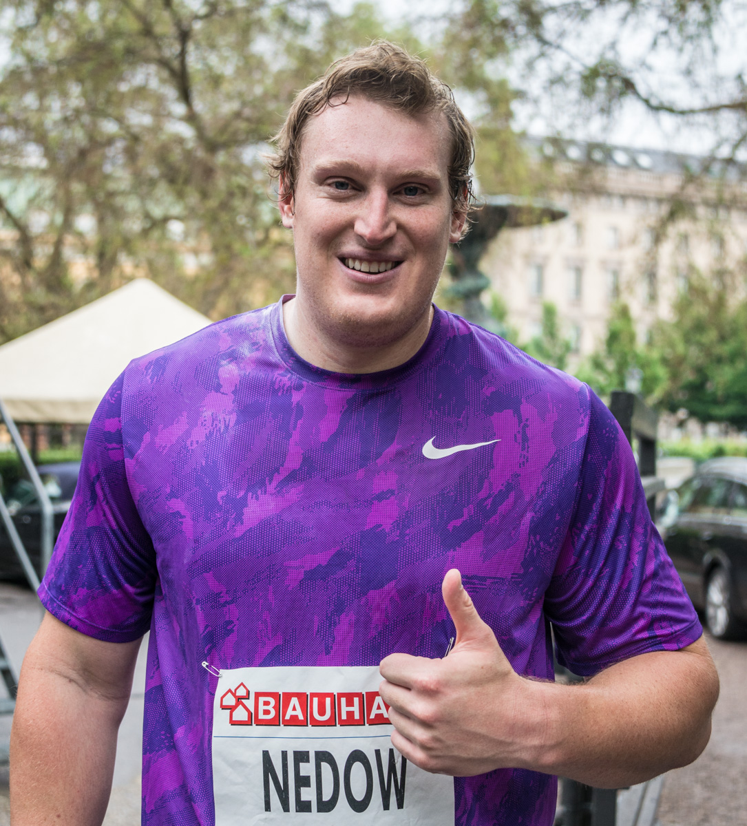 Tim Nedow under Bauhaus-galan (Diamond League) i Kungsträdgården i Stockholm den 29 juli 2015.